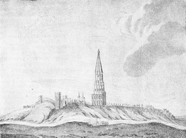 Общий вид Борисова городка